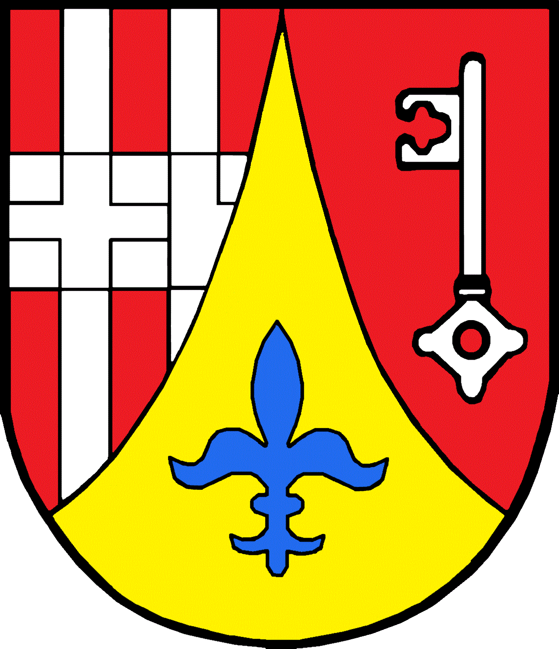 Wappen der Gemeinde Sankt Marein bei Graz, Steiermark; mit Wirkung vom 15. Juni 2020 Ein neues Gemeindewappen für die Fusionsgemeinde wurde von der Steiermärkischen Landesregierung mit Wirkung vom 15. Juni 2020 verliehen. ( 57. Verlautbarung der Steiermärkischen Landesregierung vom 28. Mai 2020 über die Verleihung des Rechtes zur Führung eines Gemeindewappens an die Marktgemeinde Sankt Marein bei Graz (politischer Bezirk Graz-Umgebung), , abgerufen am 19. Juni 2020.) Die geänderte Blasonierung lautet: „In rotem Schild golden eine bis an den oberen Schildrand reichende und mit einer blauen Lilie belegte eingebogene Spitze, rechts silbern zwei Pfähle, belegt mit einem silbernen Balken, darin ein anstoßender beiderseitig gezinnter Balken in Schattenfarbe, links silbern und pfahlweise aufrecht ein einwärtsgewandter gotischer Schlüssel.“